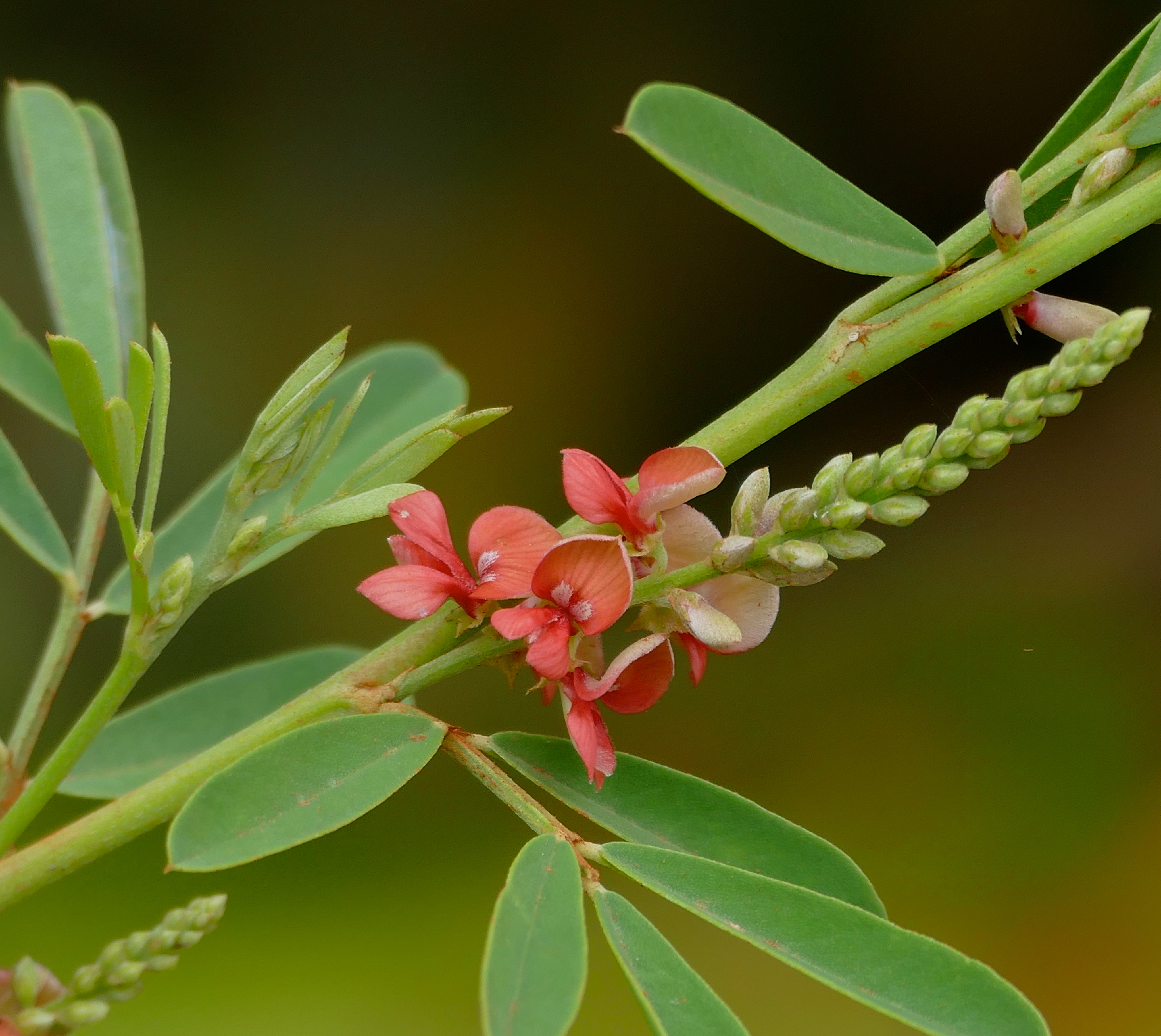 Parque Baia das Pedras Access Road, Porto Cercado Area, Poconé, Mato Grosso, BRAZIL